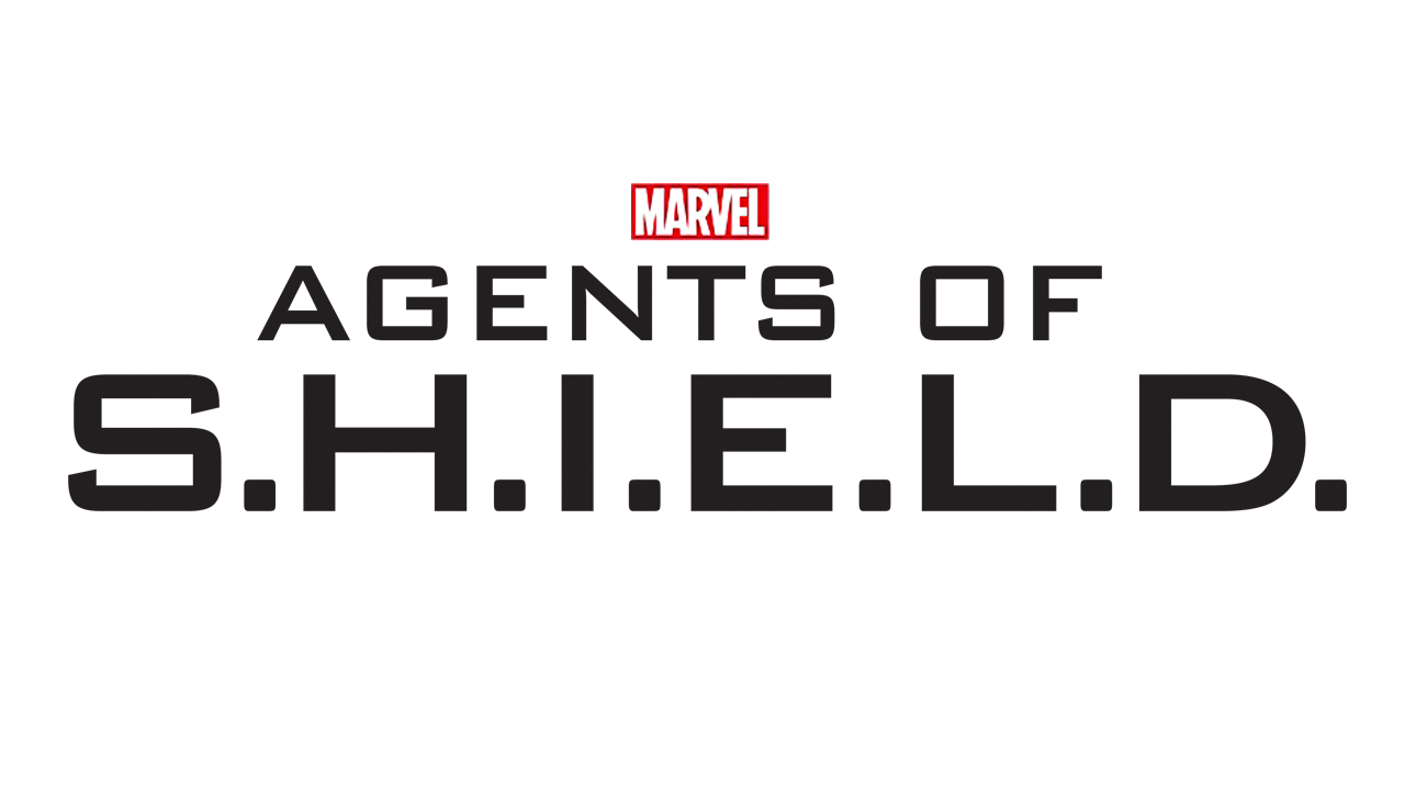 Logo de Agents of S.H.I.E.L.D.